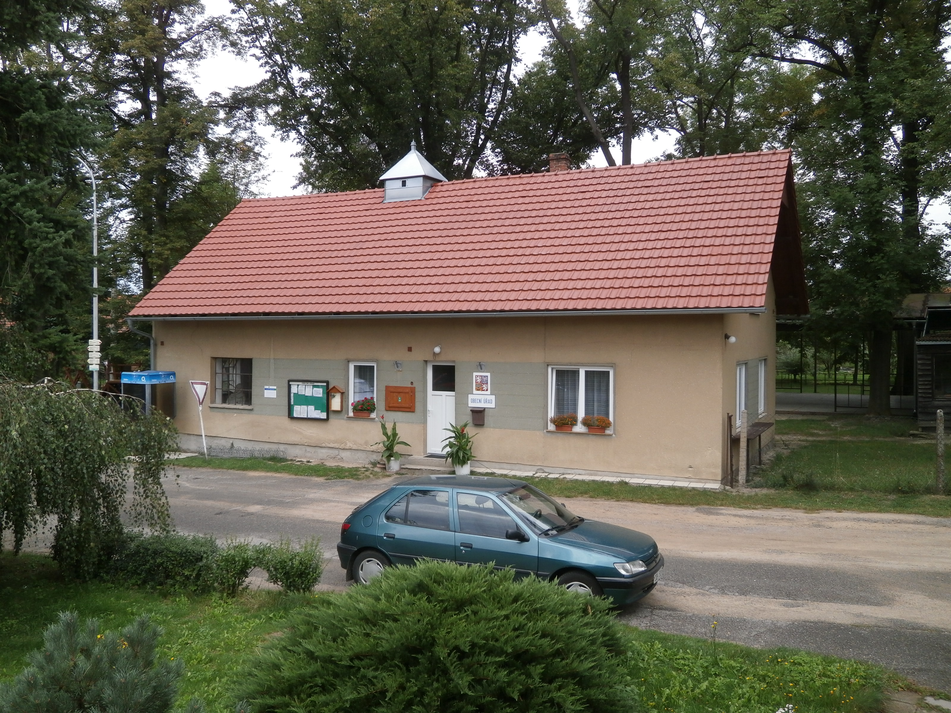 Bor u Skutče - obecní úřad